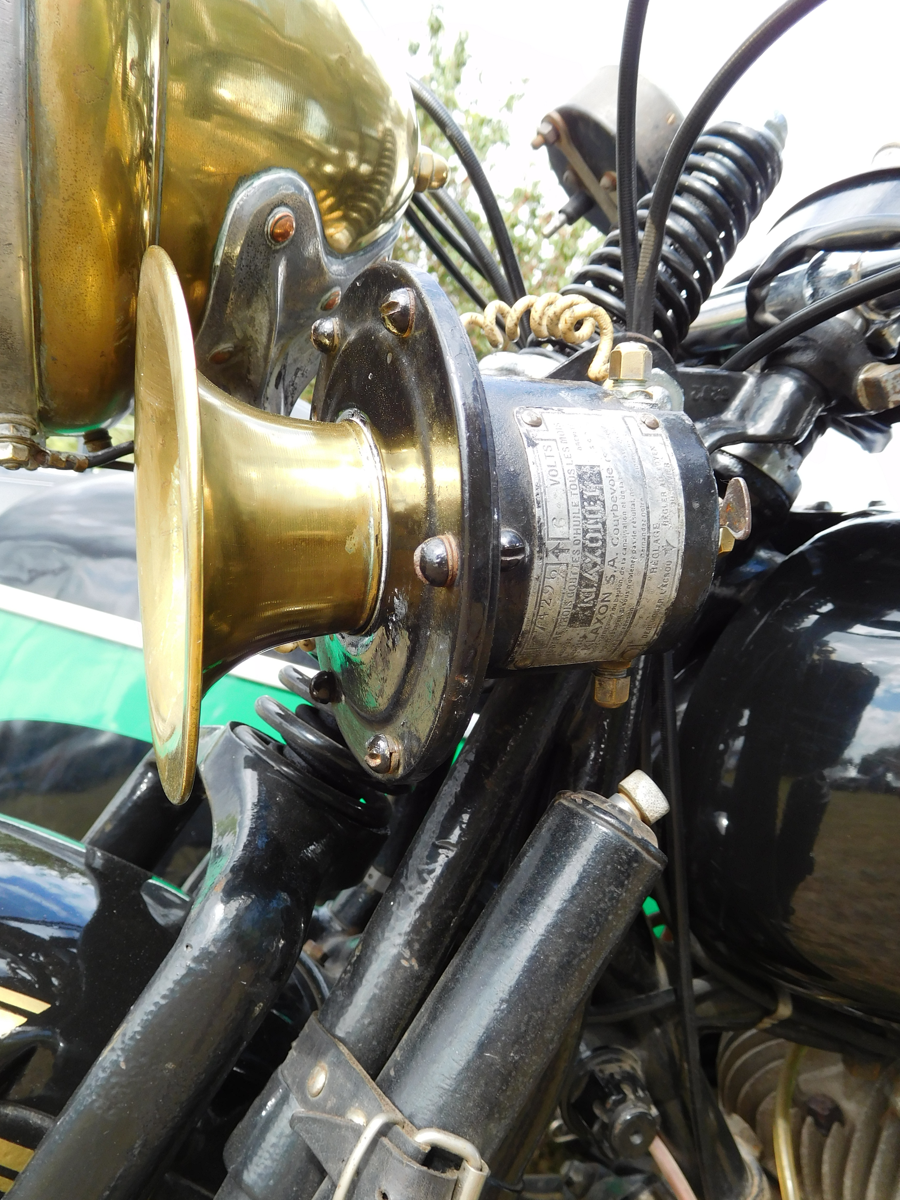 René Gillet 1 000 cm3 « L » de 1934 : Klaxon (6 volts) avec l'inscription : "mettre trois gouttes d'huile tous les mois".